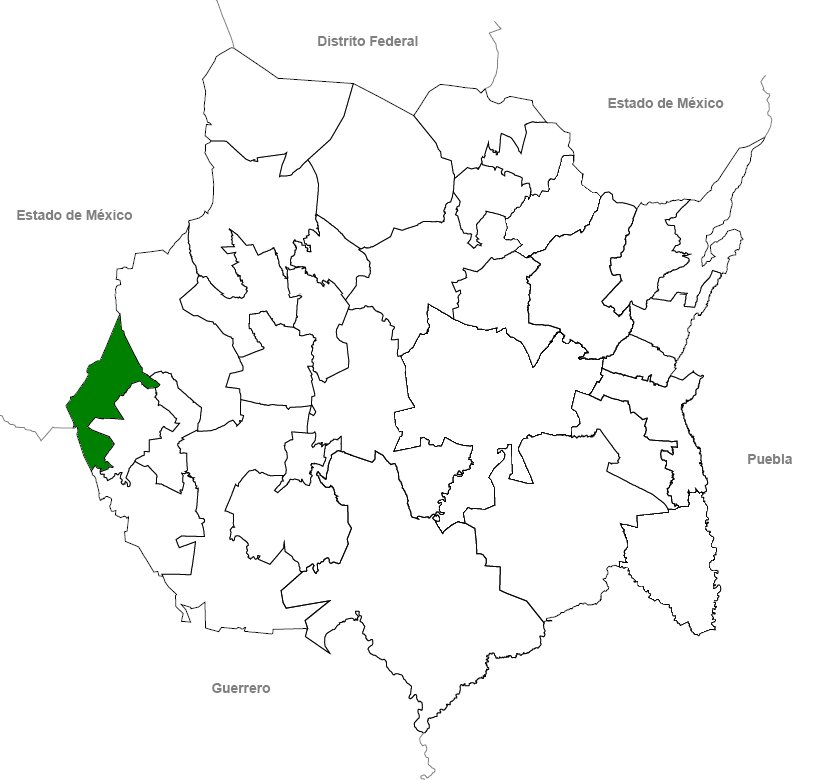 Localización de Coatlán del Río en el estado de Morelos.